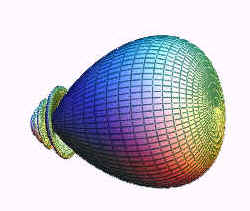 Antenna 3D patern Miguel Ferrando